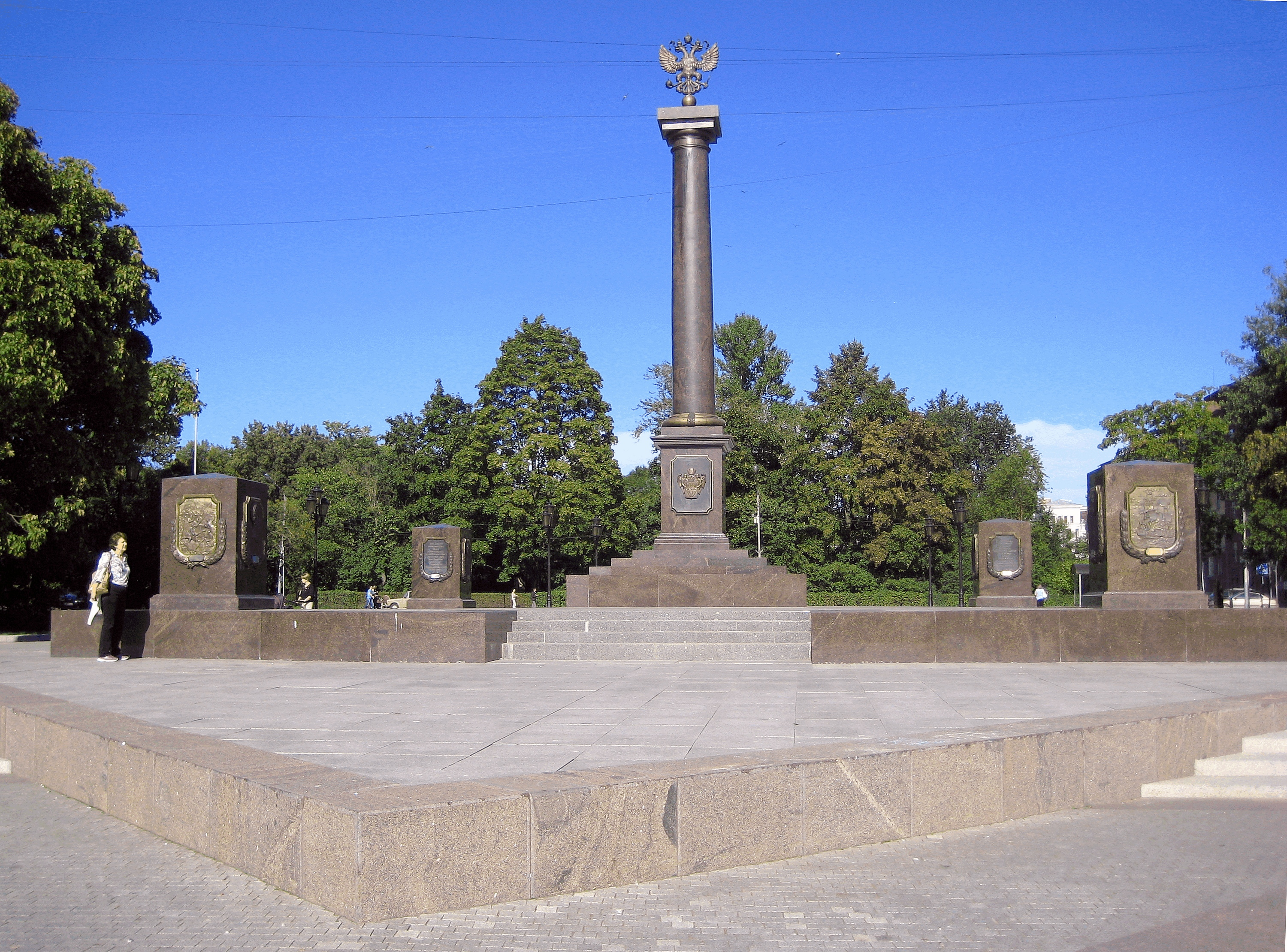 Выборг. Площадь Выборгских полков